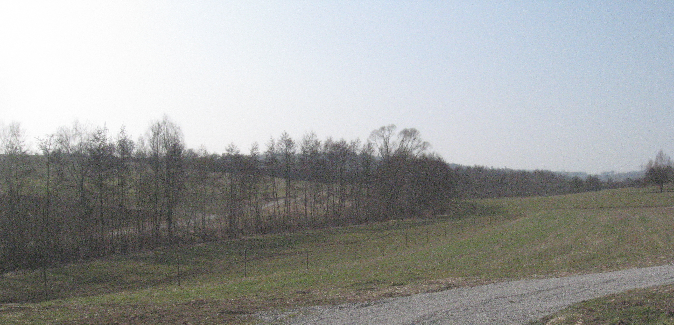 Blick nach Westen auf den Steinbach etwa 300 m oberhalb seiner Muschelkalkschlucht. Der Kamerastandort ist am Fußweg von der Vellberger Markgrafenallee hinunter zum Spielplatz an der Talquerung des Feldwegs vom Hörgershof in Richtung Obersontheim-Ummenhofen. Im Bild fließt der Steinbach noch im Unterkeuper.